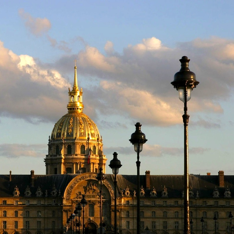 Les Invalides in Paris / Im Vordergrund das "Hôtel des Invalides", direkt dahinter der Invalidendom. Grundsteinlegung 1670. Public Domain